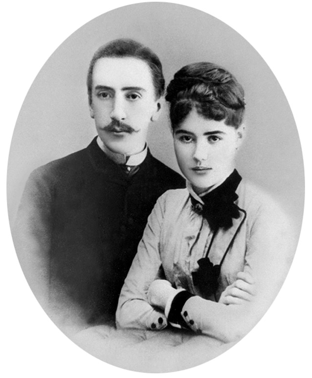 Фон Дервиз Сергей Павлович с женой М.С. фон Дервиз(урож.Шёниг). Фото кон.XIXвека.